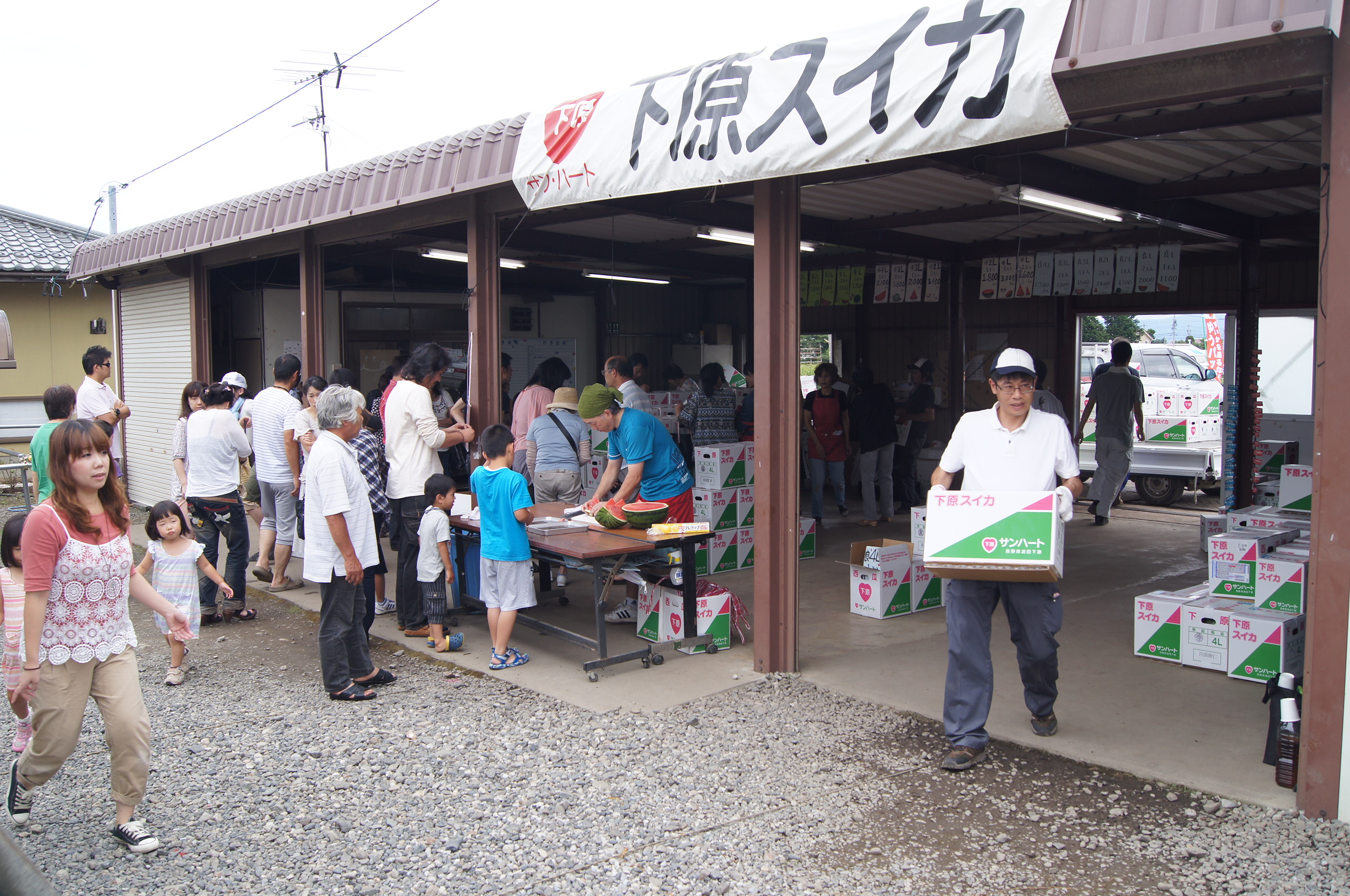 長野県松本市波田の下原集落にある下原スイカの共同直売所